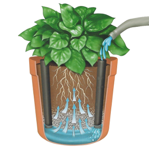 Схема фитильной гидропонной системы довольно проста, потому что она является пассивной системой. В ней раствор доставляется к корням за счет действия капиллярных сил, постепенно впитываясь в субстрат